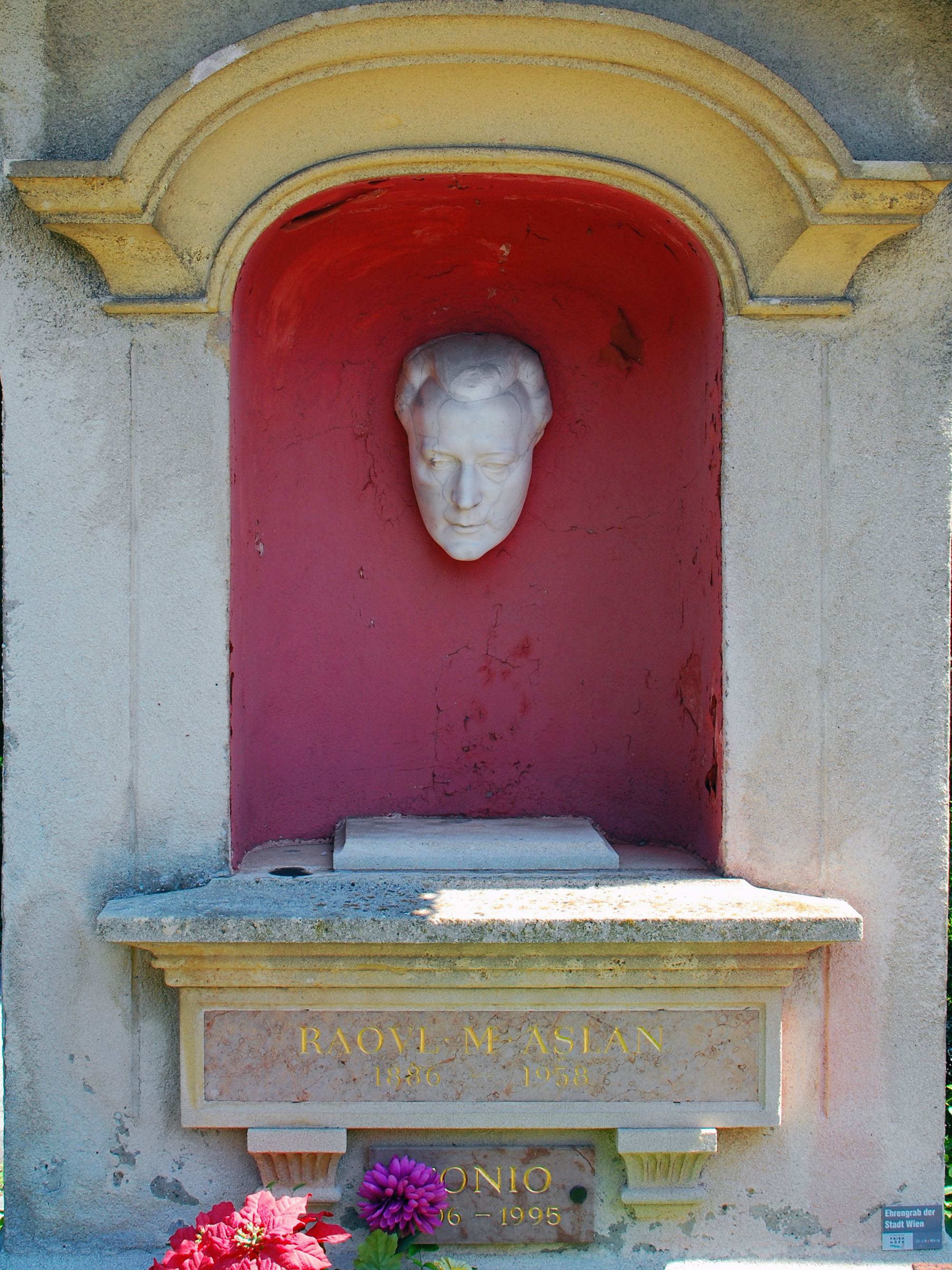 Raoul Aslan, Schauspieler